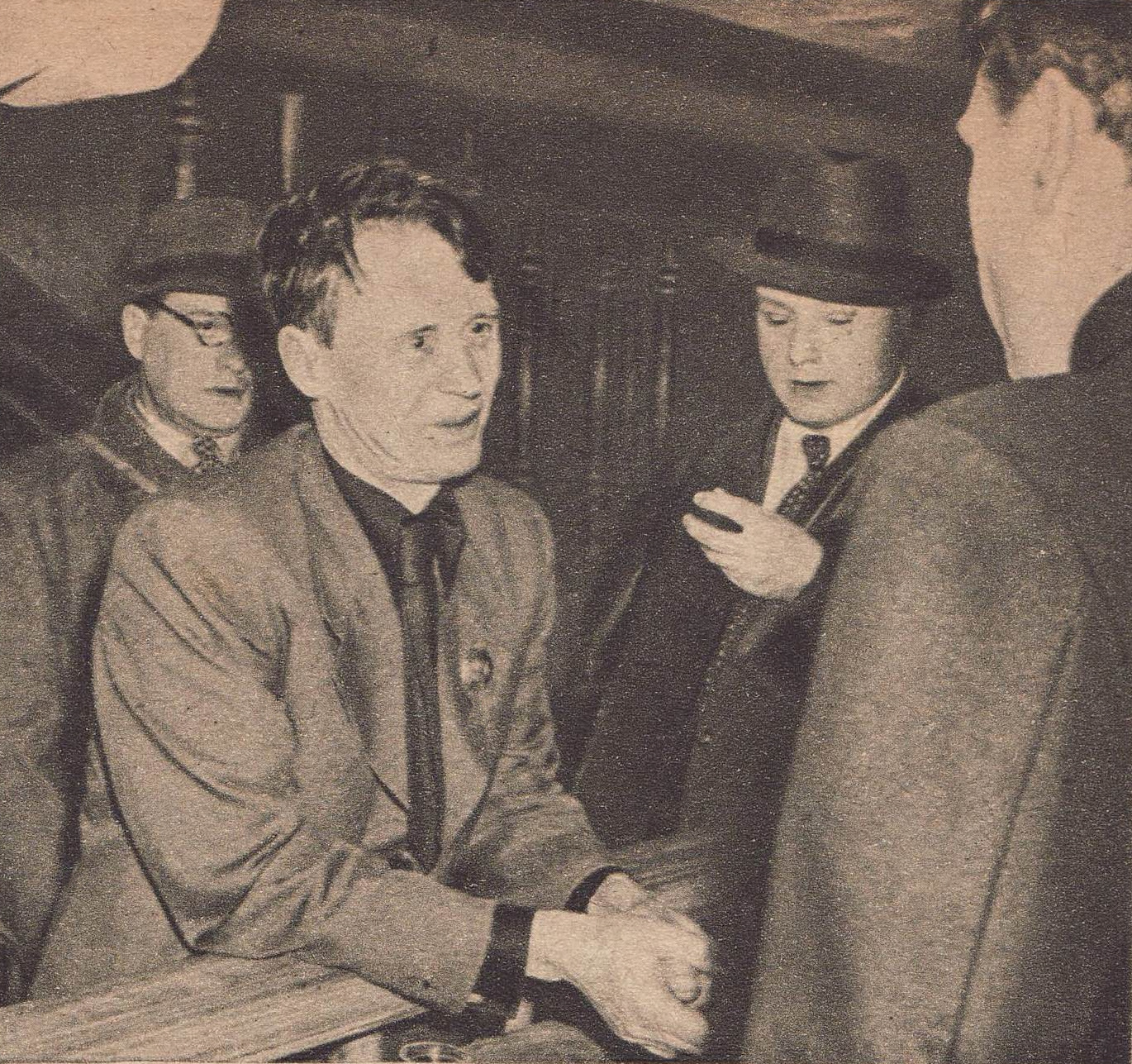 Iwan Pyriew podczas kręcenia "Opowieści Ziemi Syberyjskiej" w Czechosłowacji